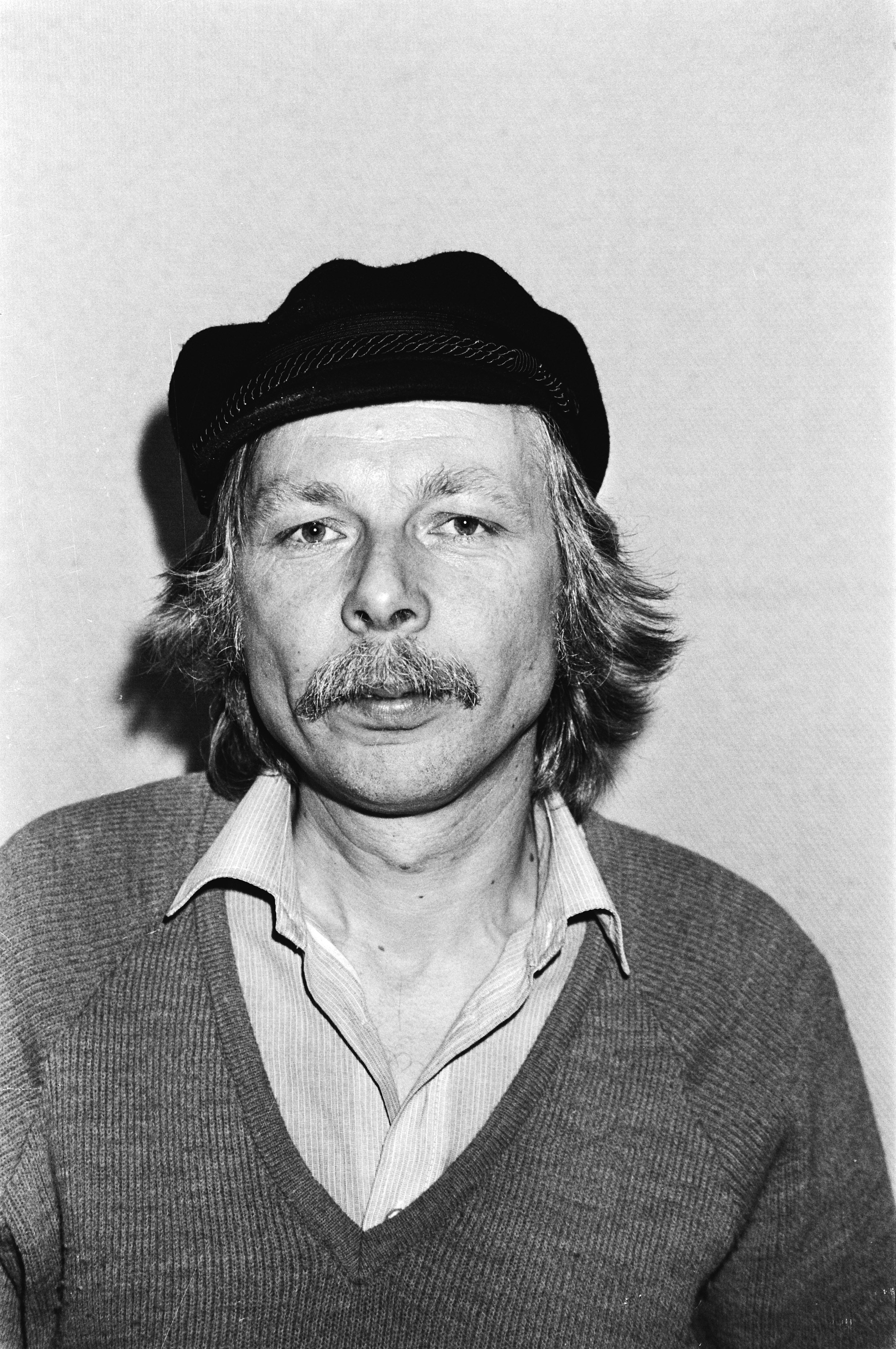 Collectie / Archief : Fotocollectie Anefo Reportage / Serie : Boekenmarkt in de Bijenkorf te Amsterdam Beschrijving : Schrijver Louis Ferron Datum : 28 maart 1981 Locatie : Amsterdam, Noord-Holland Trefwoorden : portretten, schrijvers Persoonsnaam : Ferron, Louis Fotograaf : Dijk, Hans van / Anefo Auteursrechthebbende : Nationaal Archief Materiaalsoort : Negatief (zwart/wit) Nummer archiefinventaris : bekijk toegang 2.24.01.05 Bestanddeelnummer : 931-4026